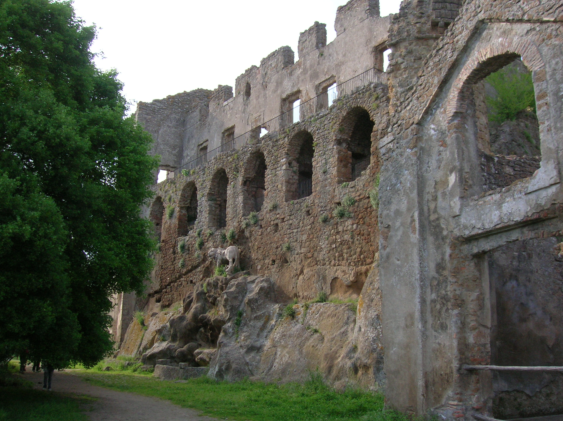 Patafisik, obra propia de Bernini en Canale Monterano, dominio público